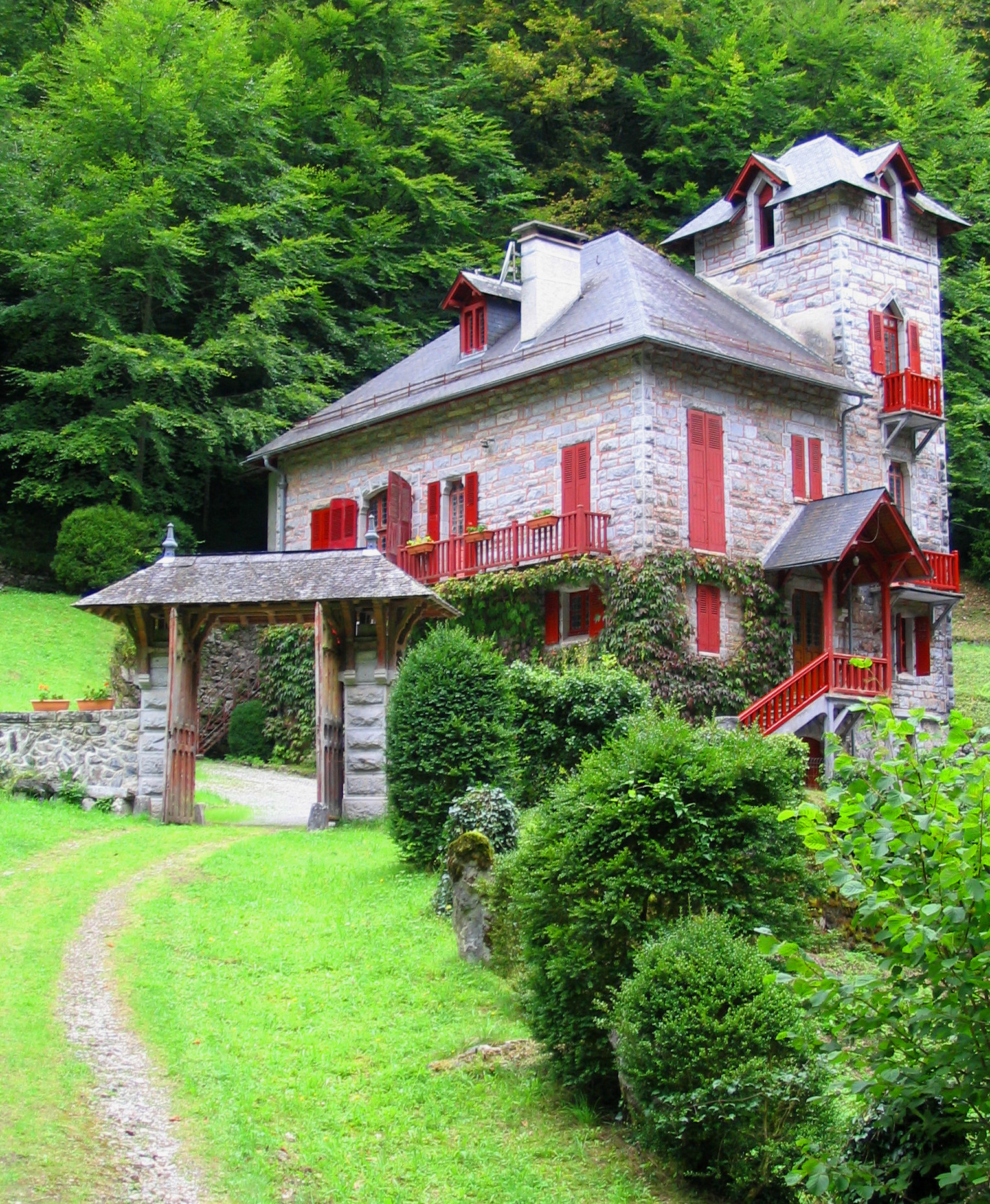 Villa promenade de l'impératrice Eaux-Bonnes Pyrénées Atlantiques Auteur: P. Charpiat - 2006